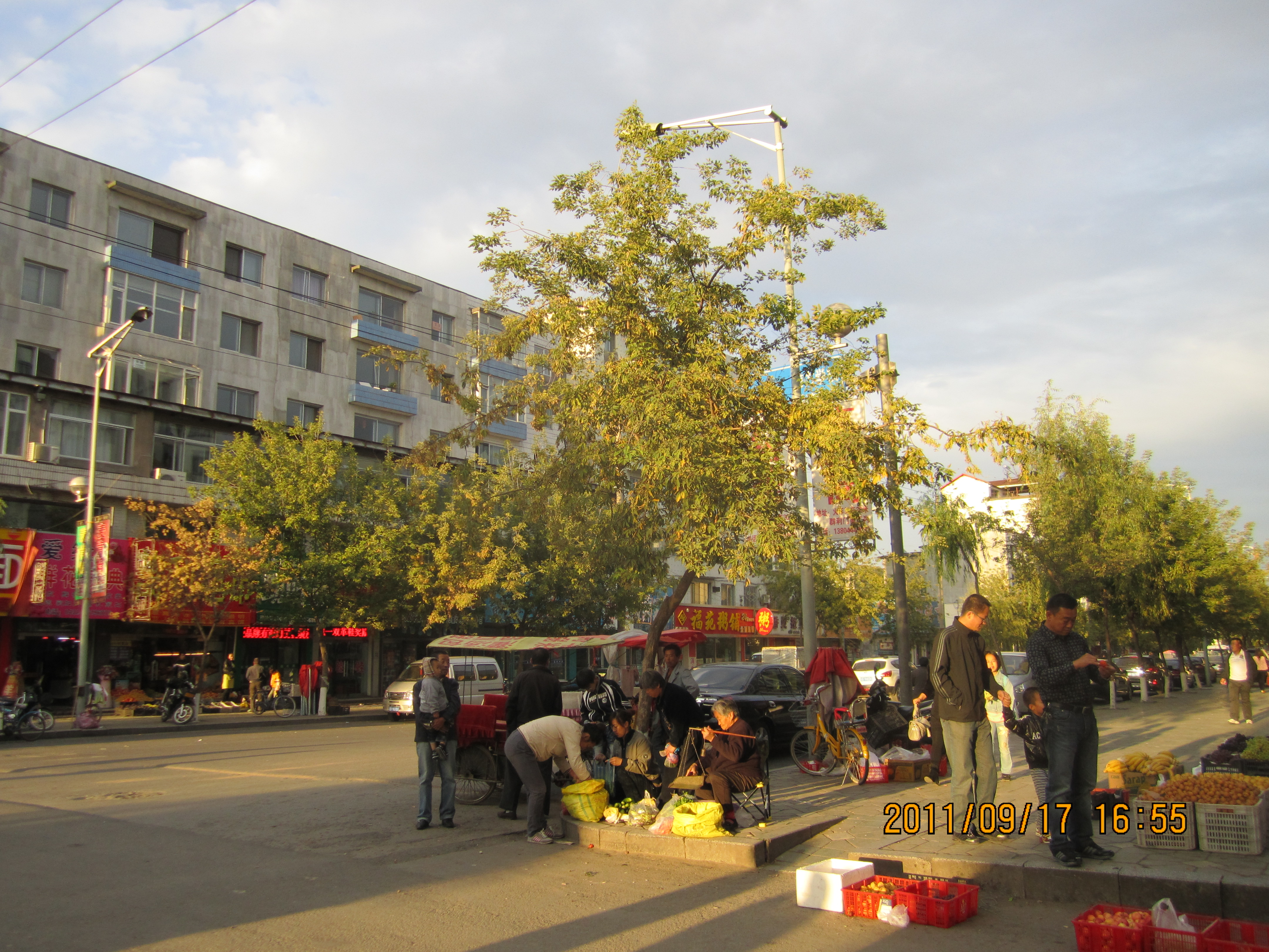 夕阳下下的桦甸街头-菜市口